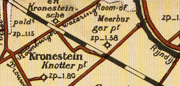 Room-_of_Meerburgerpolder